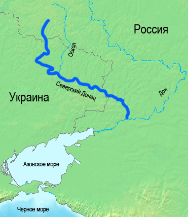 Северский_Донец